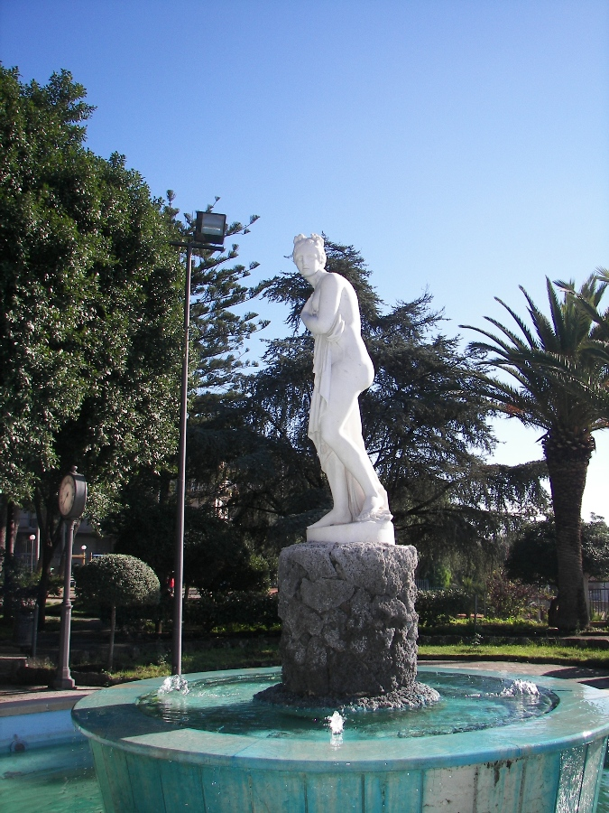 Fontana del Belvedere con la staua della Venere Italica.